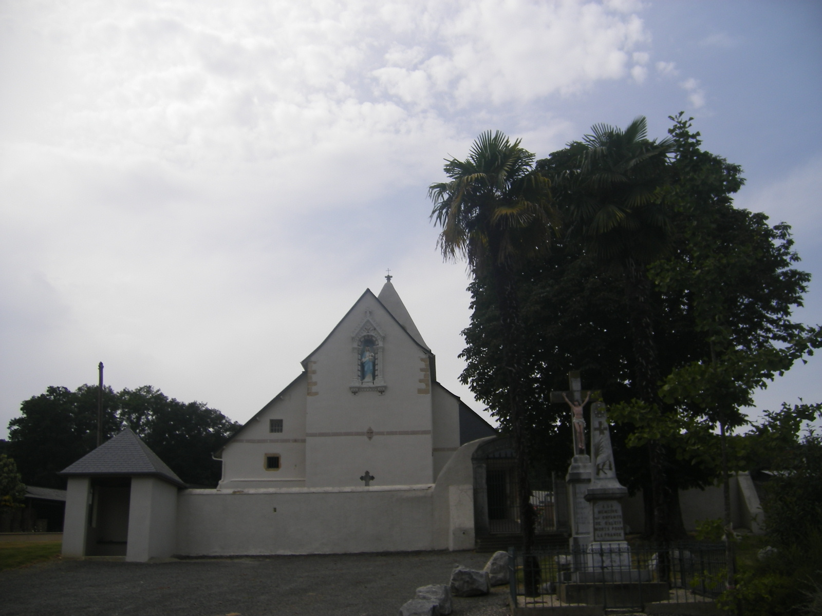 Baleix